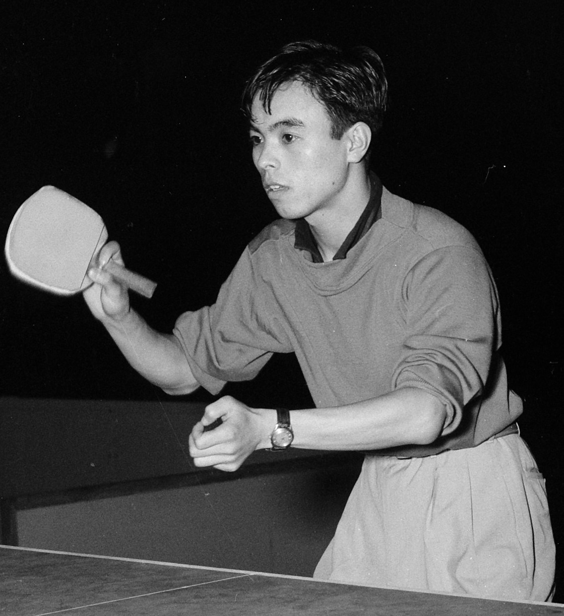 Tafeltennis Utrecht Japanner in actie